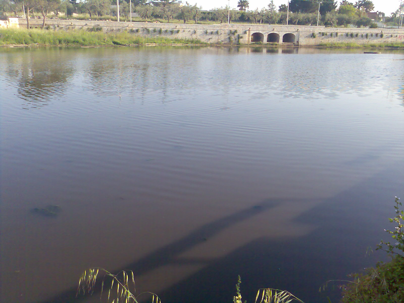 Gianluca Toro, lago Sassano